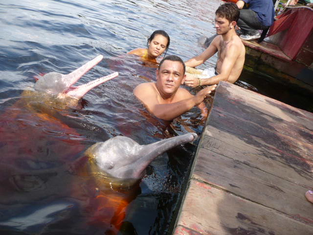 Boto (Inia geoffrensis) Cor De Rosa.